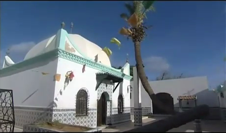 Mausolée de Sidi Lakhdar - Wilaya de Mostaganem - Algérie